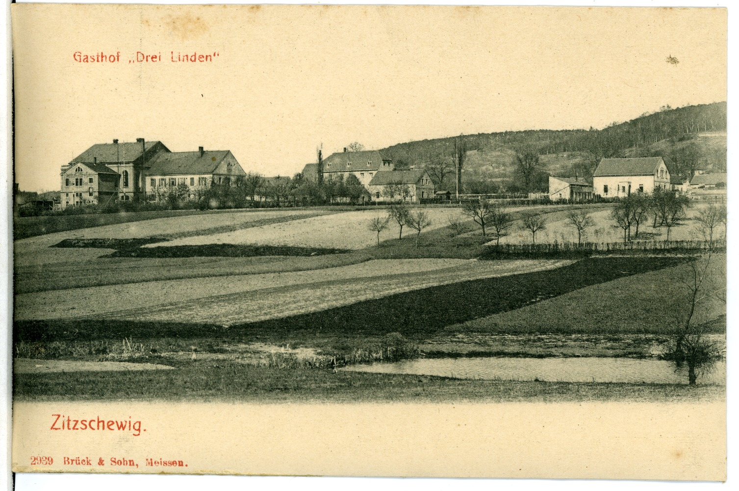 Zitzschewig; Gasthof Drei Linden This postcard is from publisher Brück & Sohn in Meißen ( postcard has a unique number 02939 and is available in a higher resolution at the publisher. This images was uploaded in a cooperation project between Wikipedians and the publisher.